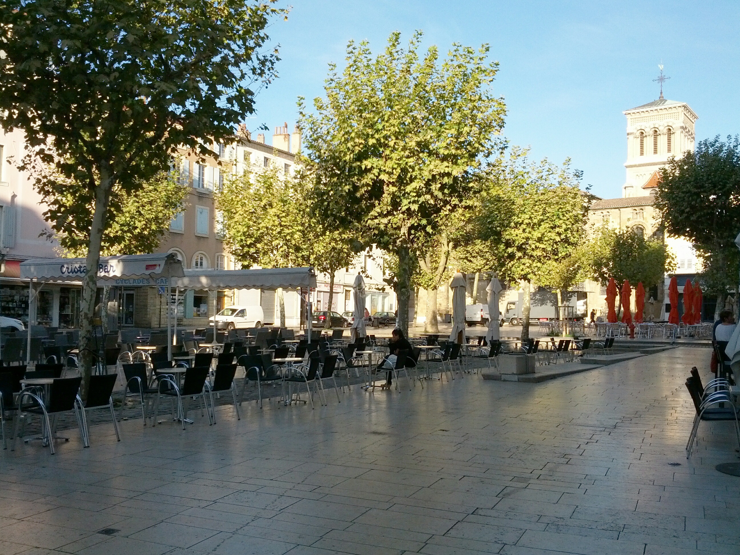 La place des Clercs à Valence (Drôme).